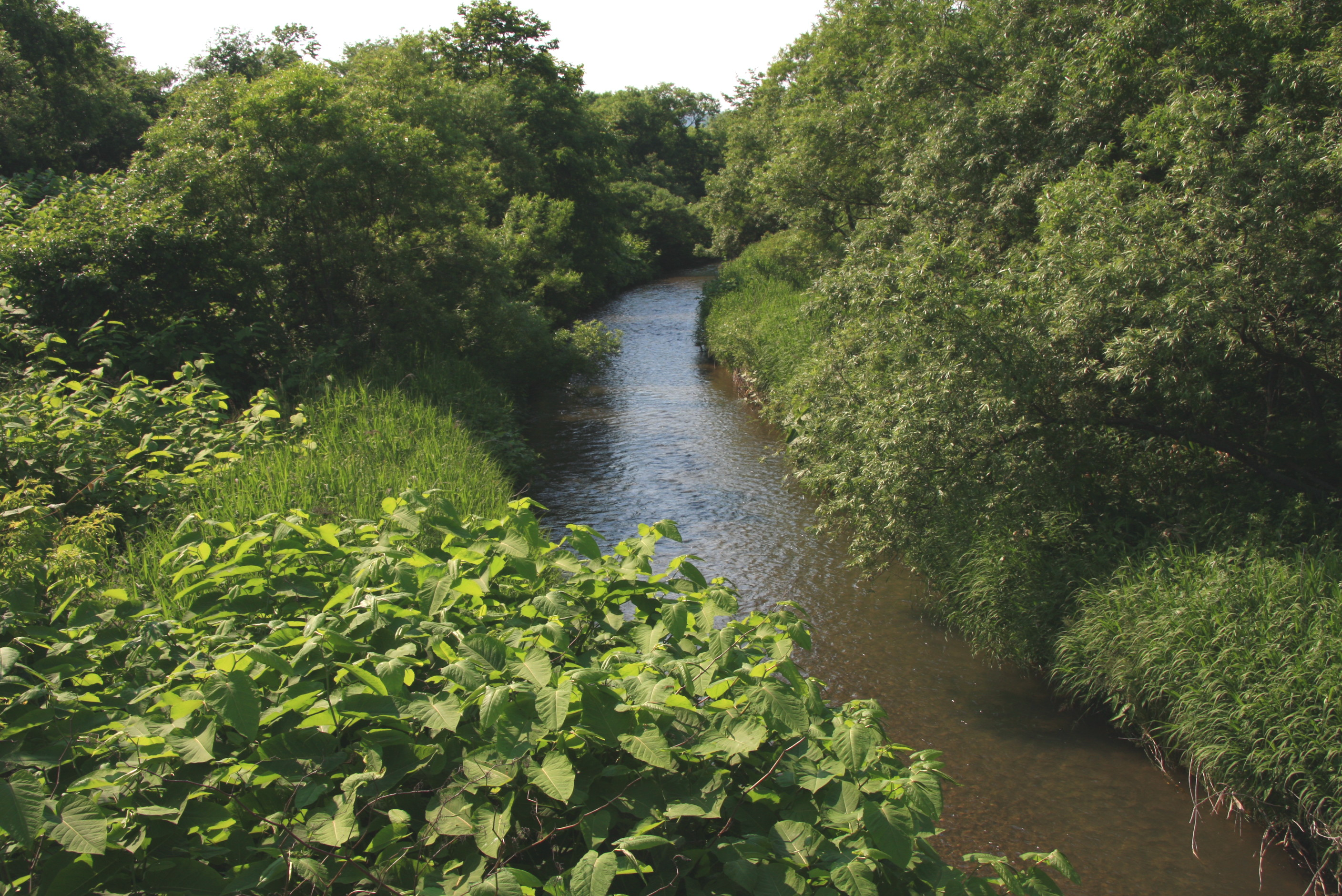 別々川（白老町社台） みのり橋より上流を望む